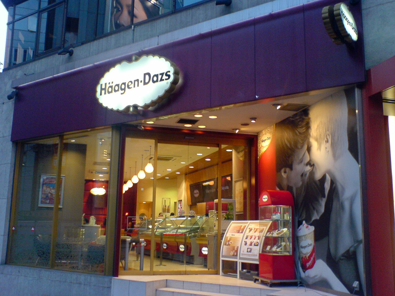 Haagrn-dazs 青山店